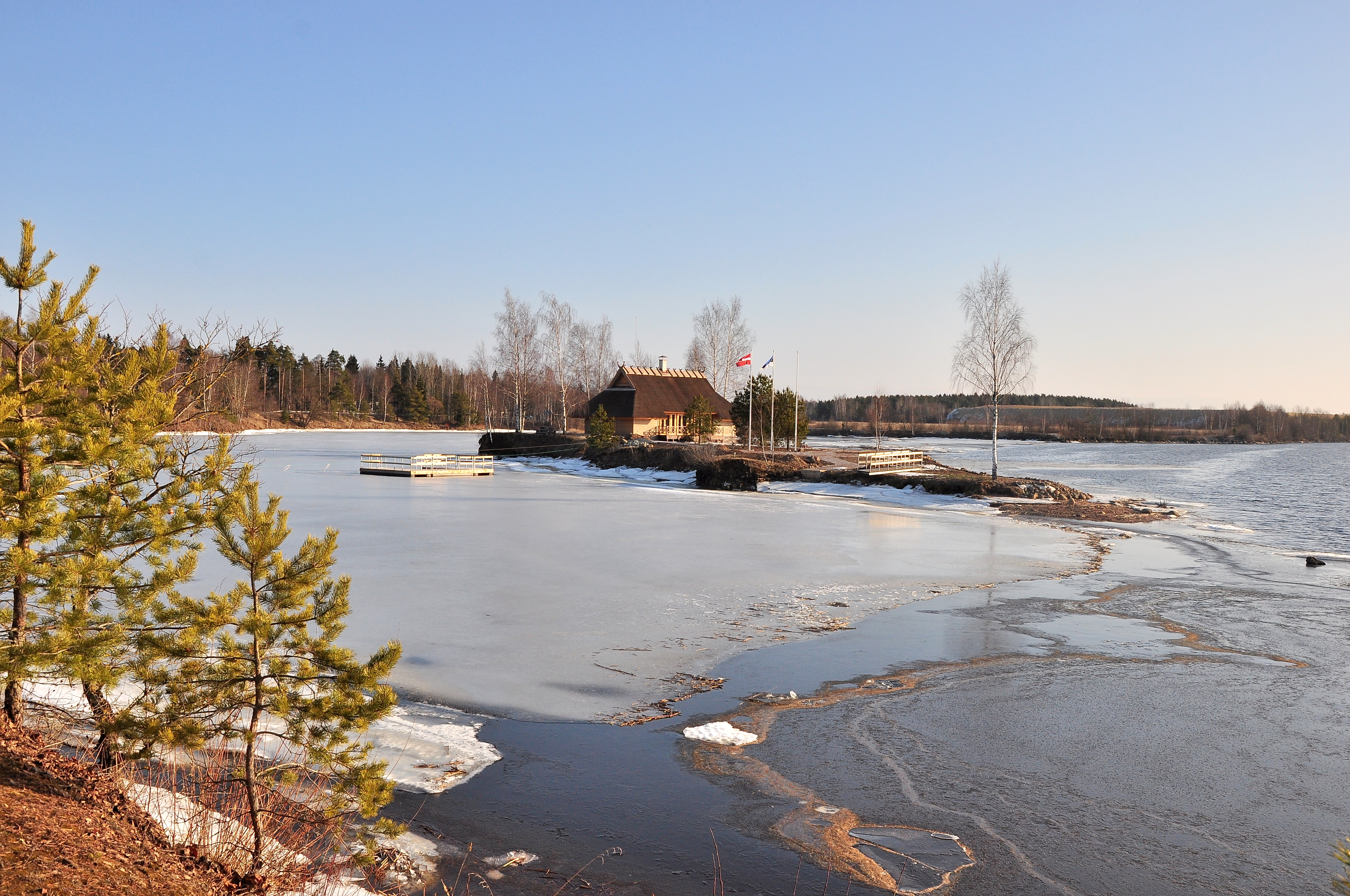 Klintaines pagasts, Latvia